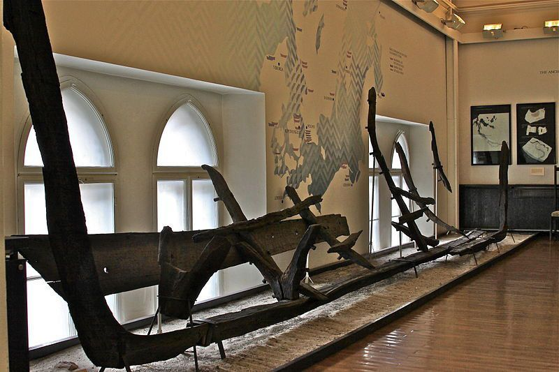 Rīgas kuģis Rīgas vēstures un kuģniecības muzejā